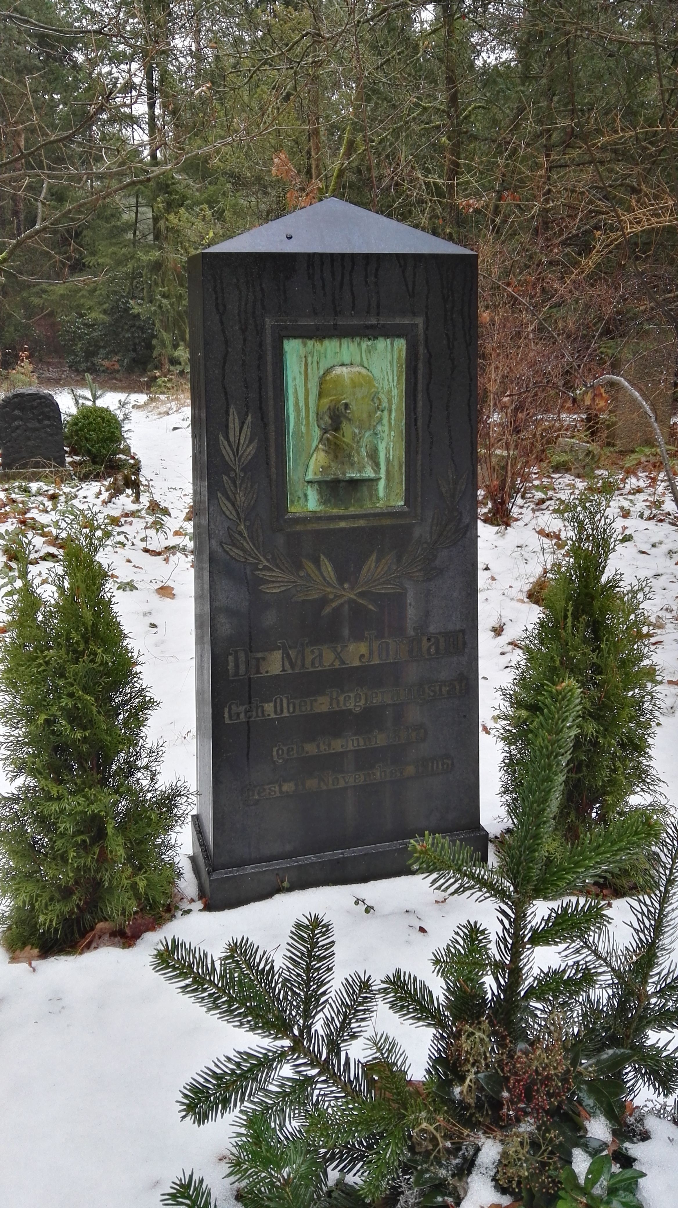 Grab von Max Jordan auf dem Südwestkirchhof Stahnsdorf; Ehrengrab der Stadt Berlin